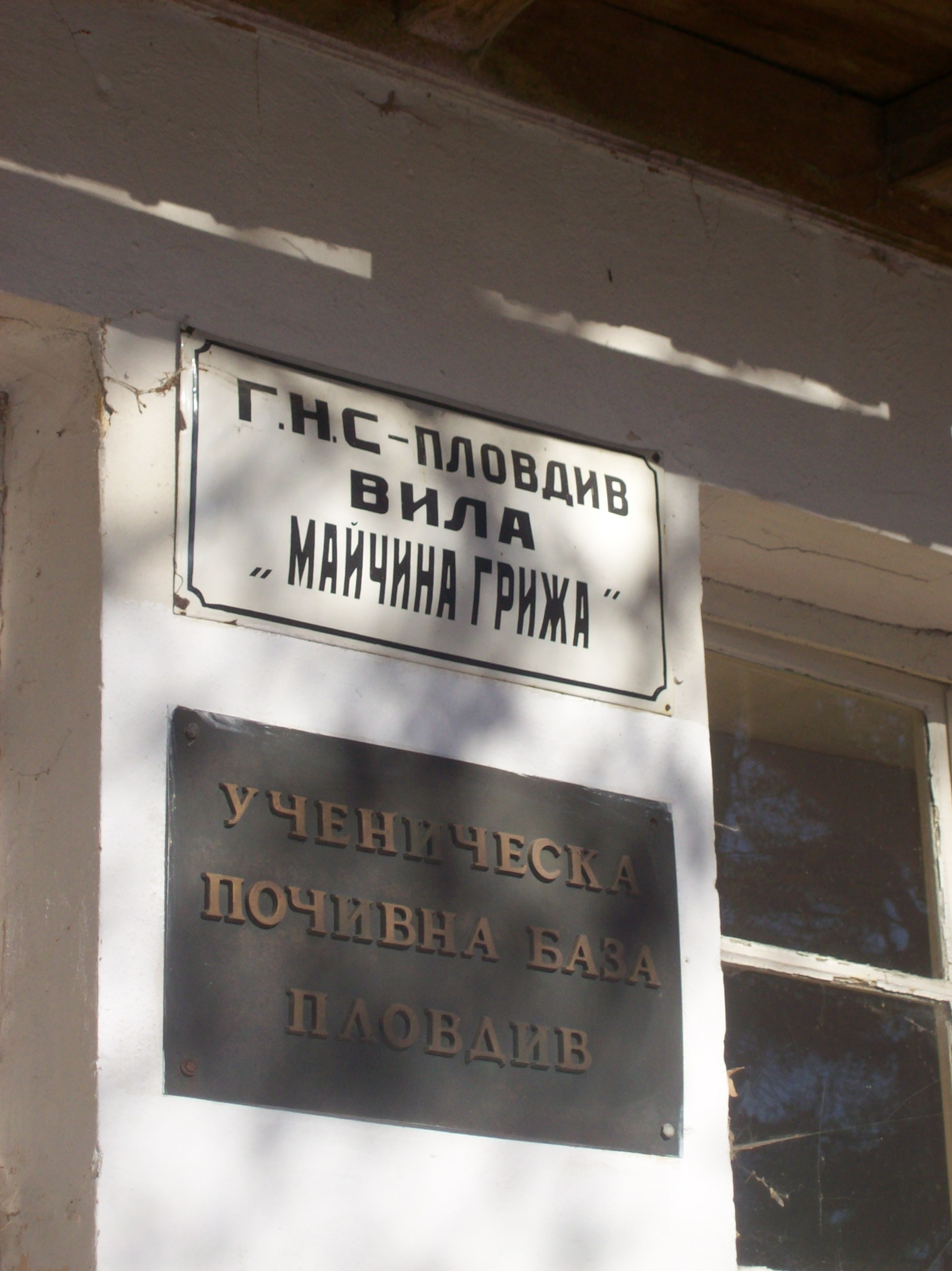 Табелата на лагерът Майчина Грижа в покрайнините на селото, Бойково